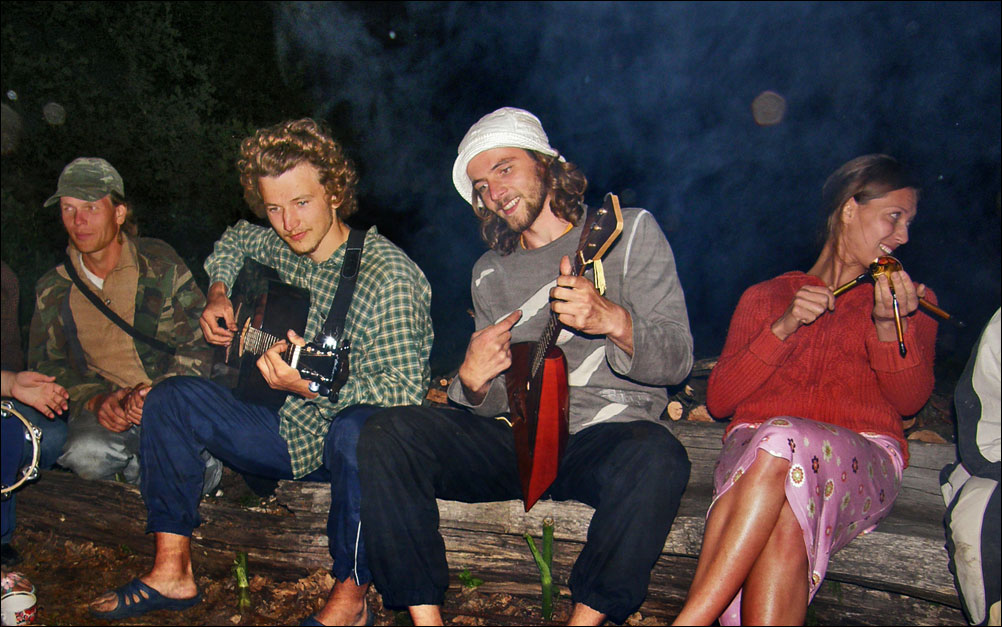 Родовое экопоселение «Кореньские родники»: день поселения. Июнь 2009.